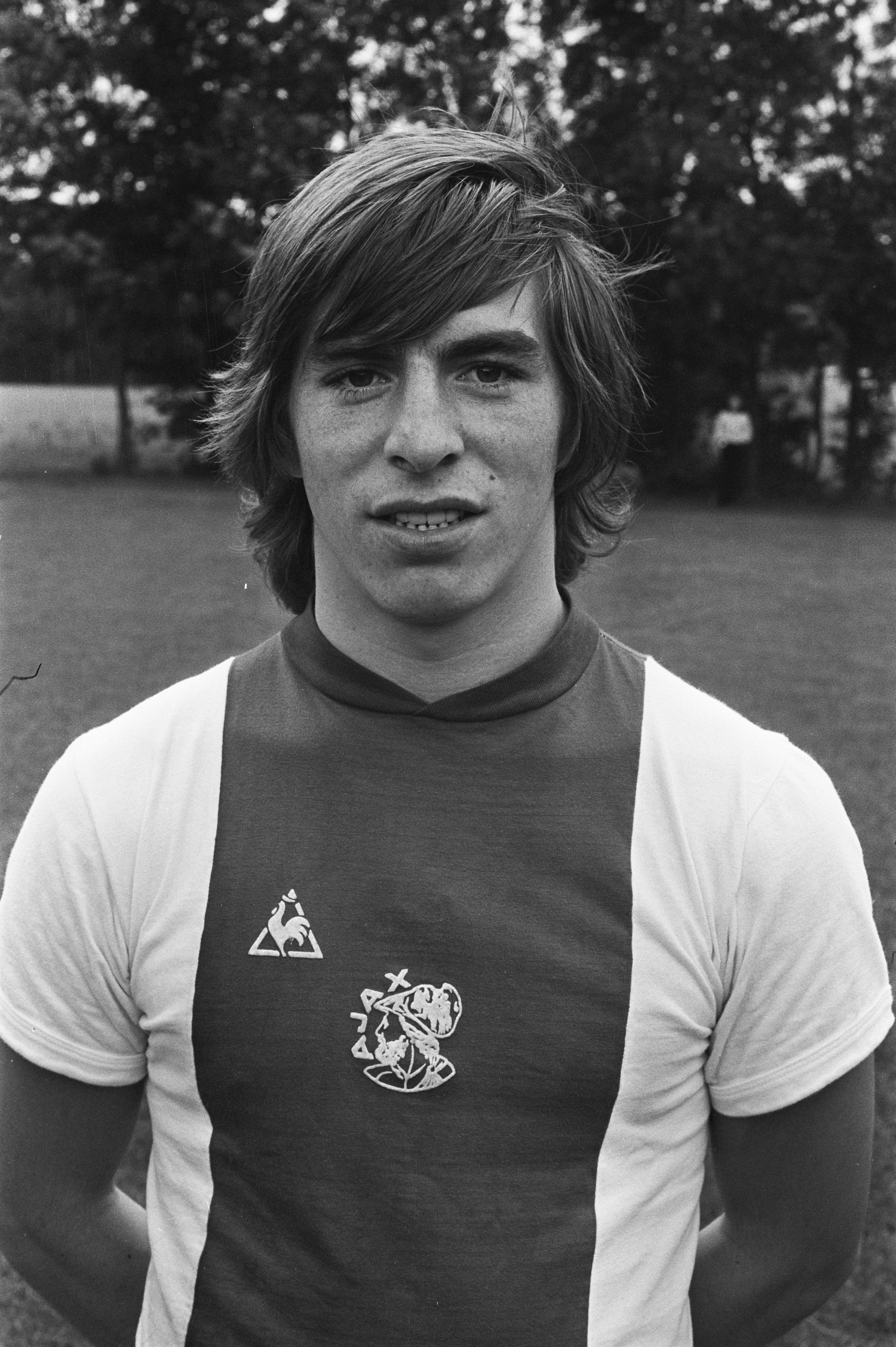 Collectie / Archief : Fotocollectie Anefo Reportage / Serie : Ajax presenteert de nieuwe selectie voor het aankomende voetbalseizoen 1975-1976 Beschrijving : Johnny Dusbaba Datum : 15 juli 1975 Locatie : Amsterdam, Noord-Holland Trefwoorden : portretten, sport, voetbal Persoonsnaam : Dusbaba, Johnny Instellingsnaam : AJAX Fotograaf : Bert Verhoeff / Anefo Auteursrechthebbende : Nationaal Archief Materiaalsoort : Negatief (zwart/wit) Nummer archiefinventaris : bekijk toegang 2.24.01.05 Bestanddeelnummer : 928-0504